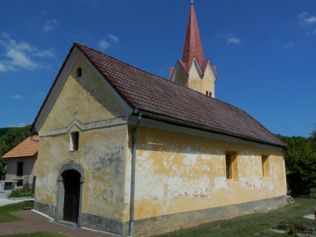 Sveti Mihael v Dolenjih Raduljah